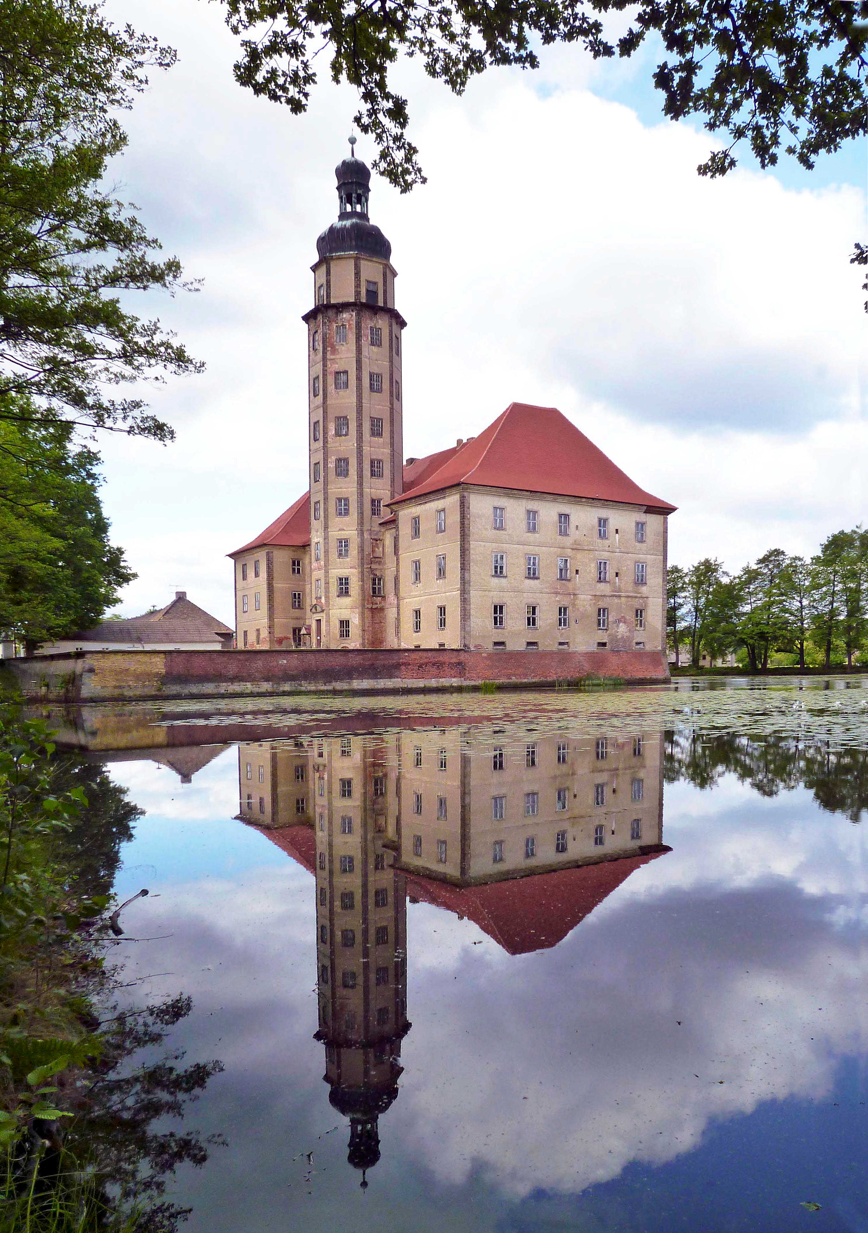 Schloss Reinharz